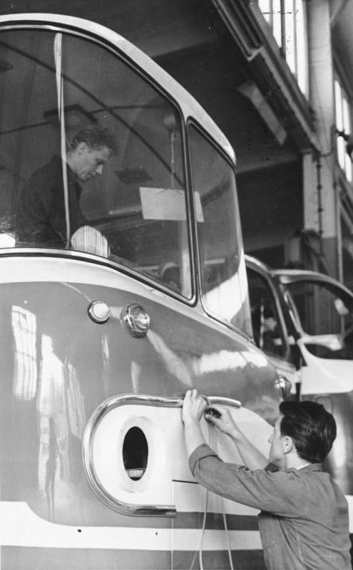 Gera, Fahrzeugfabrik Fleischer KG Zentralbild/Liebers 25.8.1966 Neuer moderner Reiseomnibus in der Montage Gera, In der Karosserie- und Fahrzeugfabrik Fritz Fleischer KG, werden alte Ifa-Busse durch Rekonstruktion auf das modernste ausgestattet. Monteur Manfred Krüger bringt hier zur Verschönerung der Vorderfront Zierleisten an.